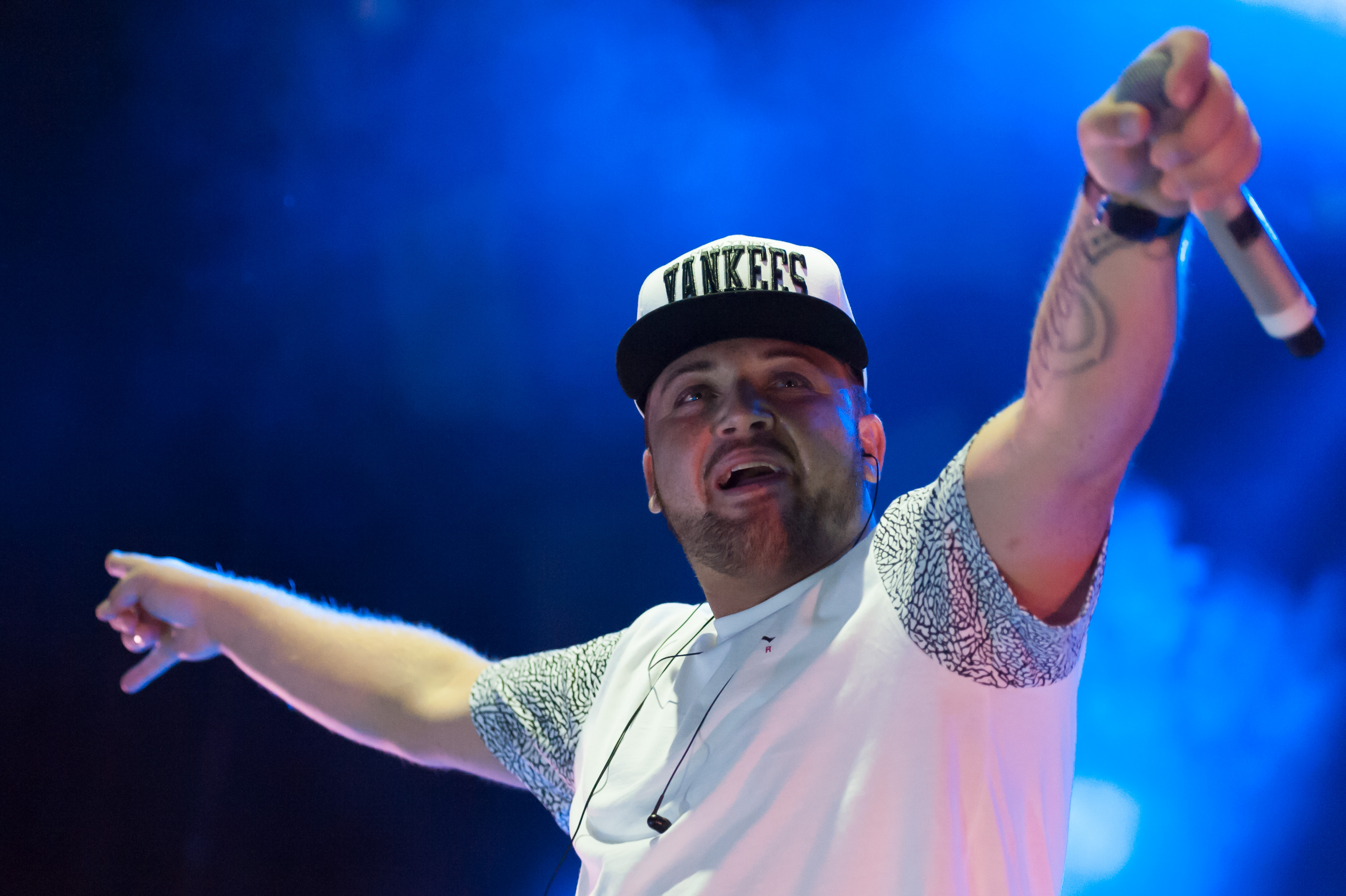 DSDS - Live on Tour 27. Juli 2014, Stadthalle Wien Menowin Fröhlich